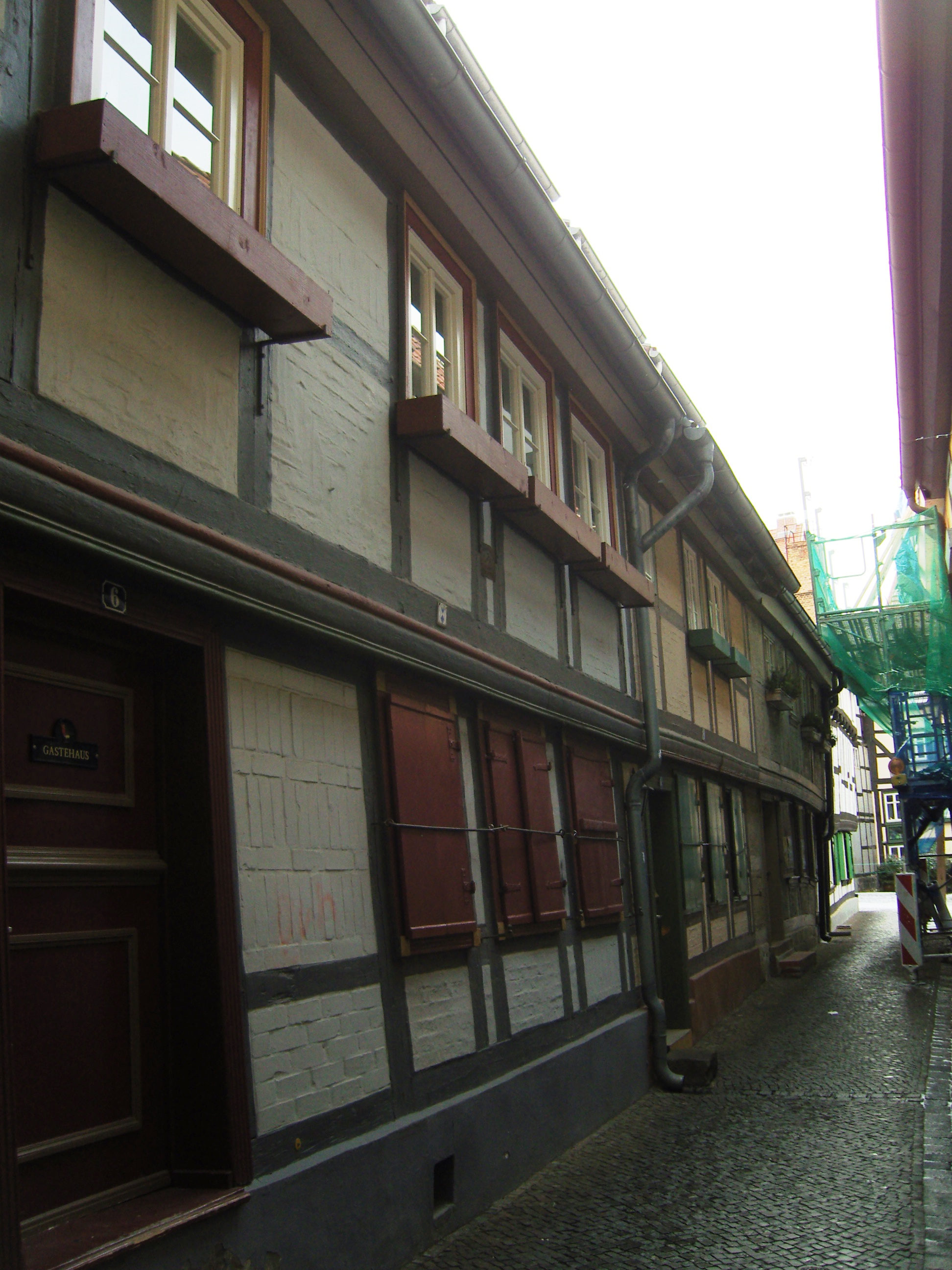 Denkmalgeschütztes Handwerkerhaus im Schuhhof 6 (vorn) und Schuhhof 7 (hinten) in Quedlinburg